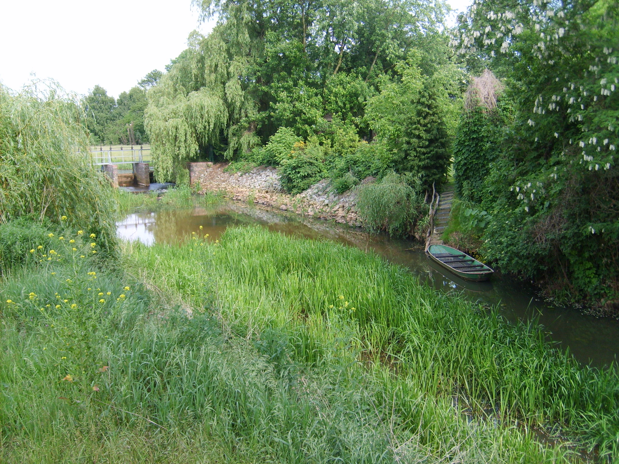 Maasdorf